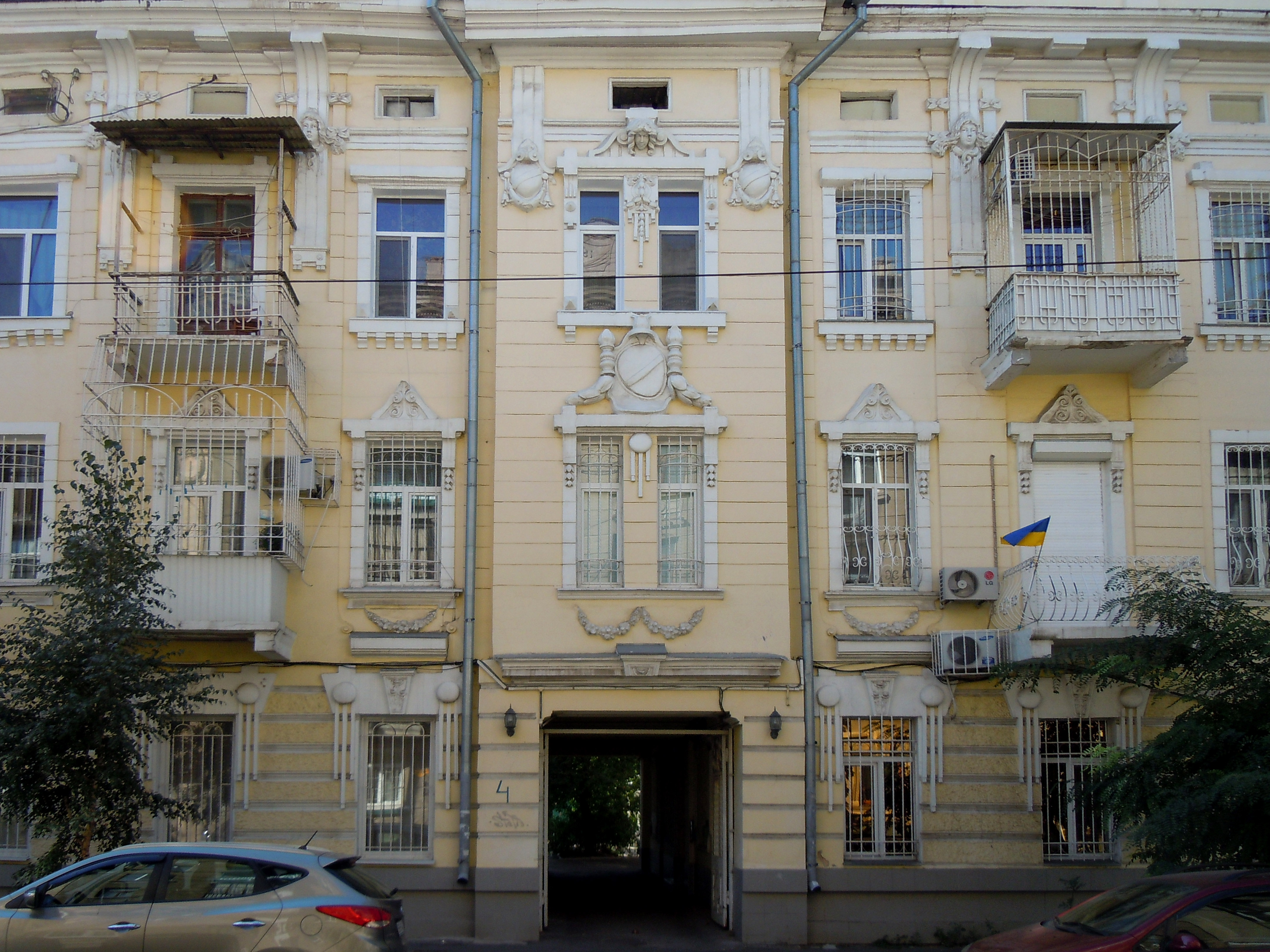 Будинок прибутковий, Одеса, Канатний пров., 4